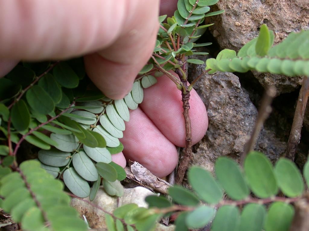 Phyllanthus leptoclados：ハナコミカンボク 2006/08/11 沖縄本島中部：Okinawa Island, Japan